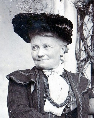 Flora Annie Steel, britische Autorin (1897-1929)